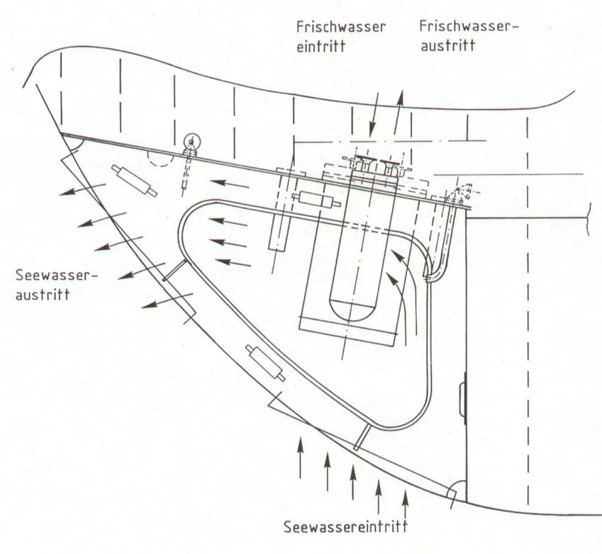 Prinipdarstellung eines Seekastenkühlers